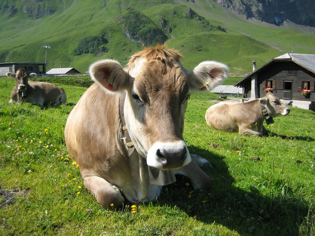 Typisches Braunvieh in den Schweizer Alpen